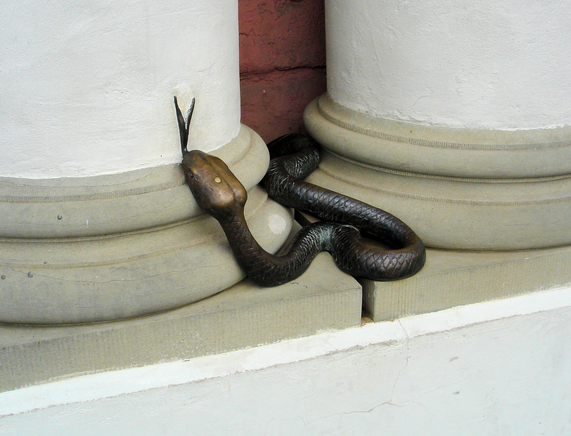 Skulptur „Schlange“ am Rathaus in Rostock